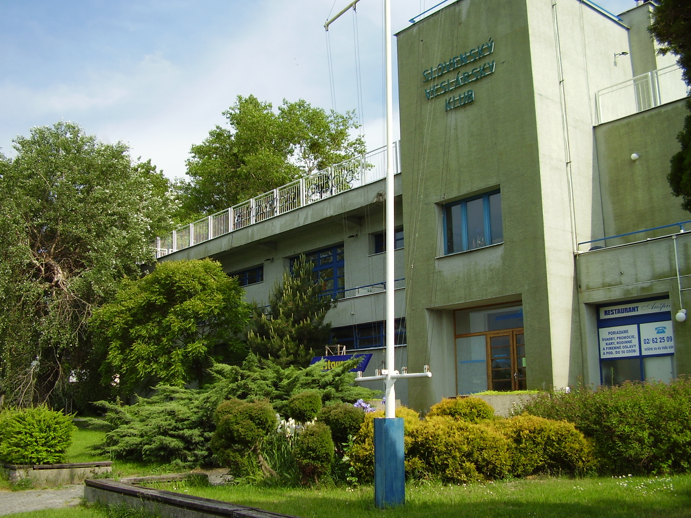 Aušpic restaurant, Petržalka